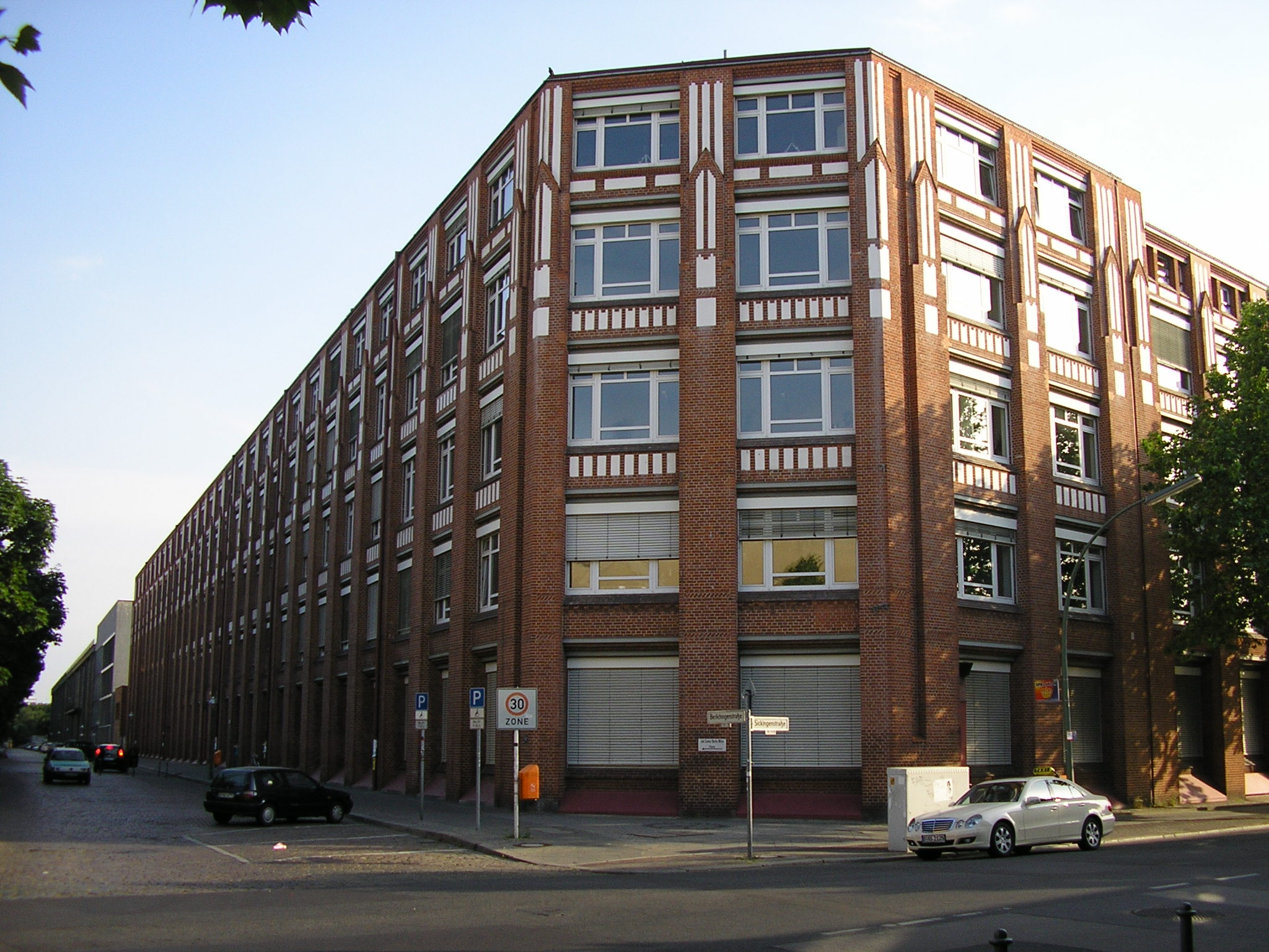 Ehemaliges Telefunken-Werk für Elektronenröhren in der Sickingenstraße 71 in Berlin-Moabit. Von 1907 bis 1912 als Glühlampenwerk Moabit von der AEG gebaut, übernahm Osram 1919 das Glühlampenwerk und fertigte in dem nun Werk A (wie AEG) genannten Gebäudekomplex von 1920 bis 1939 auch Elektronenröhren für Telefunken. 1939 ging die Moabiter Fabrik in den Besitz von Telefunken über und war von 1952 bis 1960 Unternehmenssitz der Firma. Seit 2005 ist dort das JobCenter Berlin Mitte untergebracht.